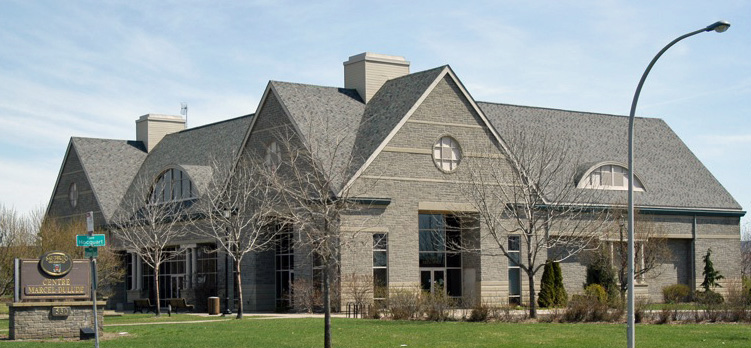 Le Centre socioculturel de Saint-Bruno-de-Montarville, rue Clairevue, été inauguré en 1997 et nommé Centre Marcel-Dulude en 2001.